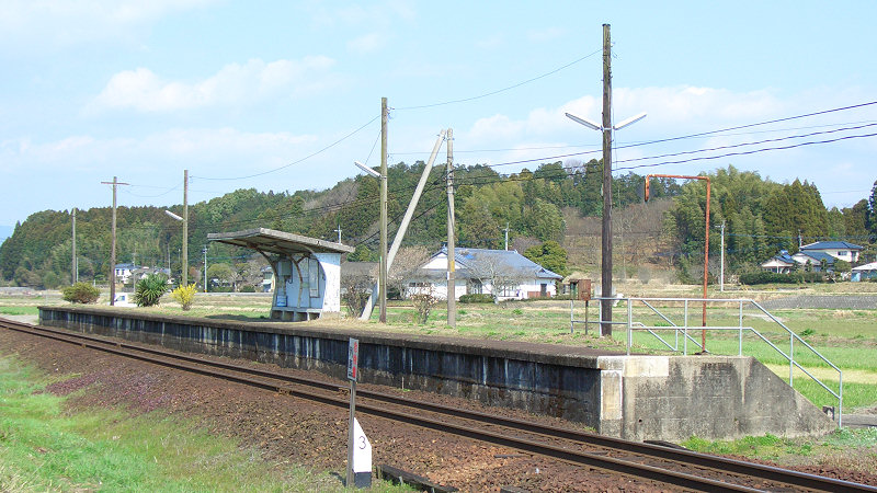 くま川鉄道湯前線ja:木上駅 ホーム 写真手前がja:人吉駅方面。 撮影者/著者/著作権保有者 : MK Products (本人がアップロード) 撮影日 : 2007/03/14 木上駅用にアップロードした画像です。良い画像があれば別の画像に変えてください。